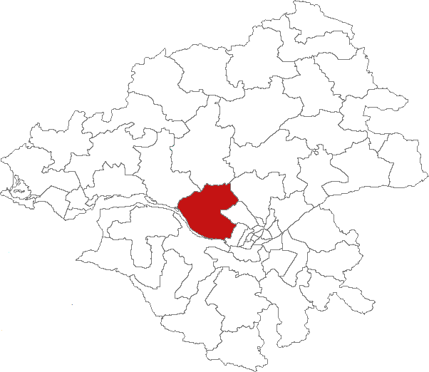 Carte de localisation du canton de Saint-Etienne de Montluc (France, Loire-Atlantique)